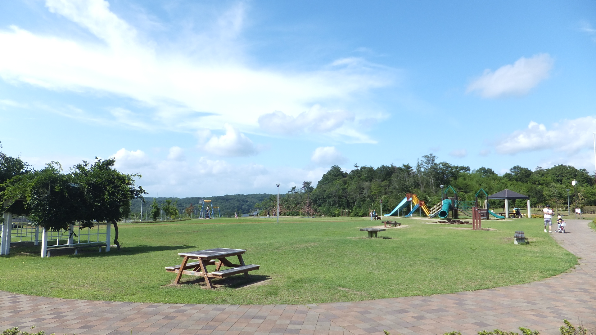 三木防災公園 遊戯広場